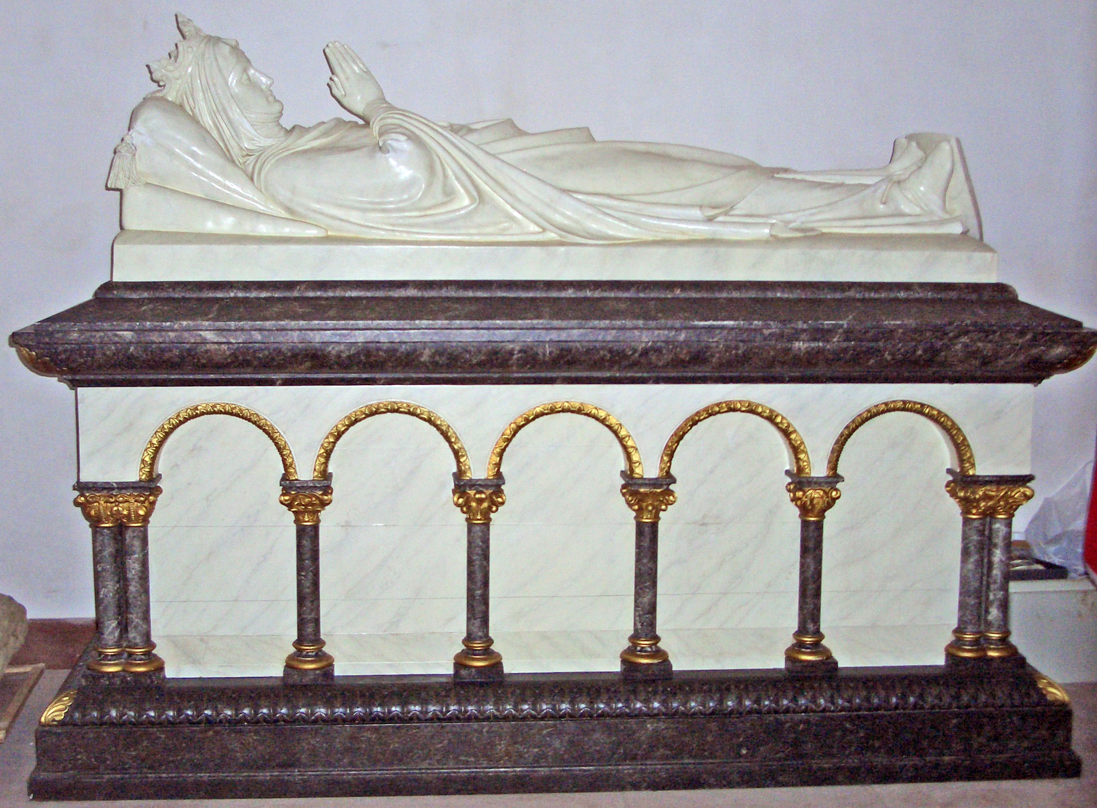 Graf vun der Ermesinde an der Krypte zu Clairefontaine (Belsch).